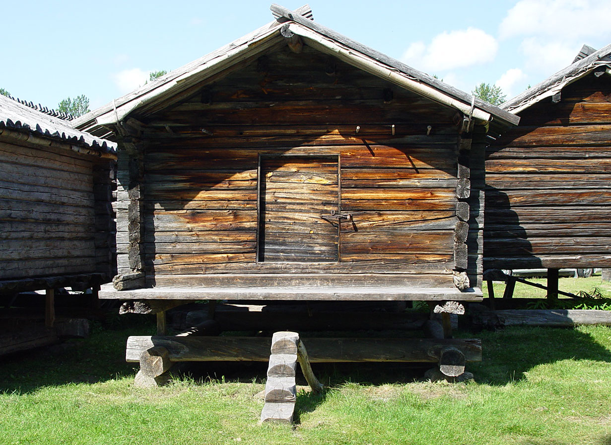 Lappstaden in Arvidsjaur